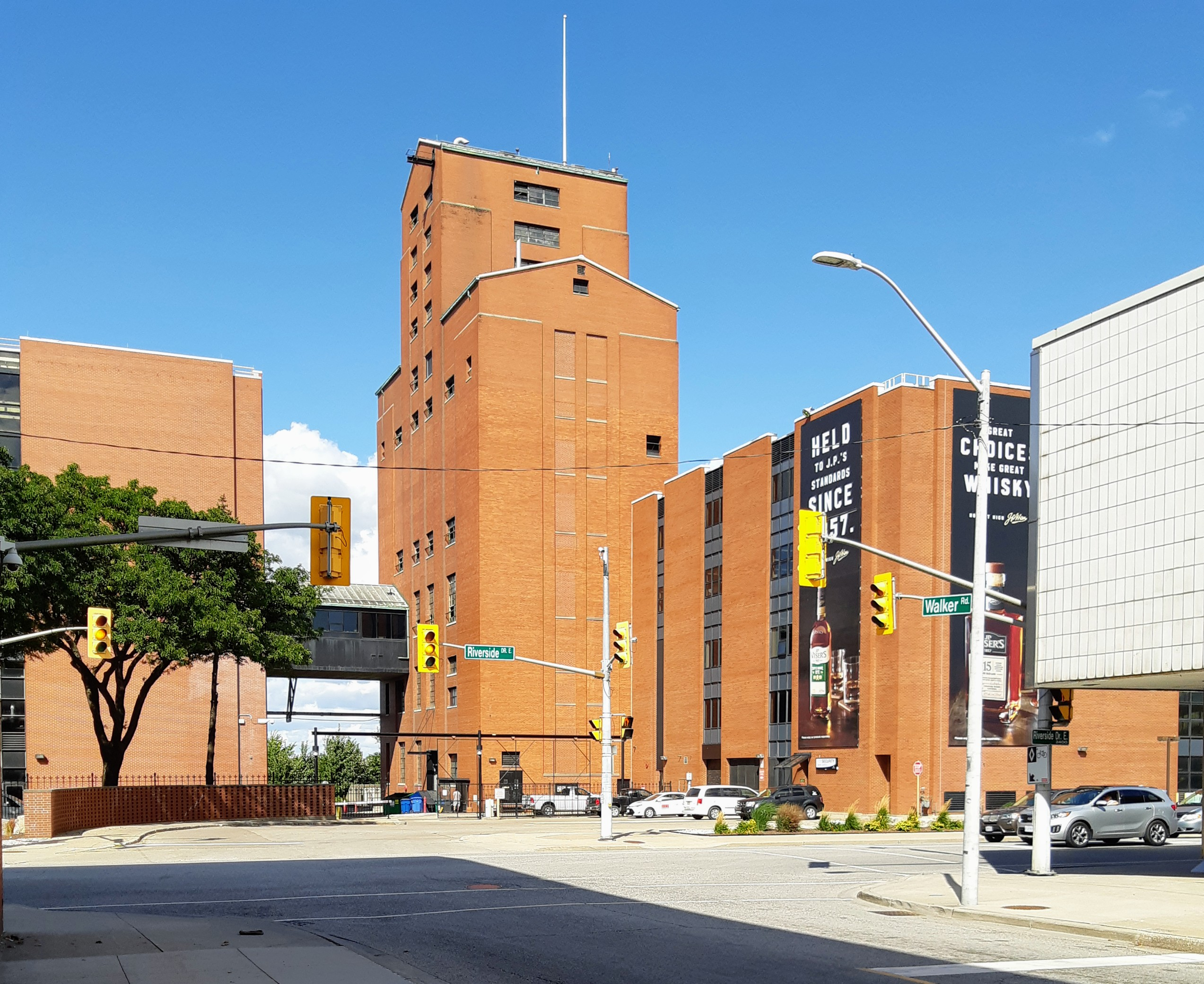 Hiram Walker distilleries